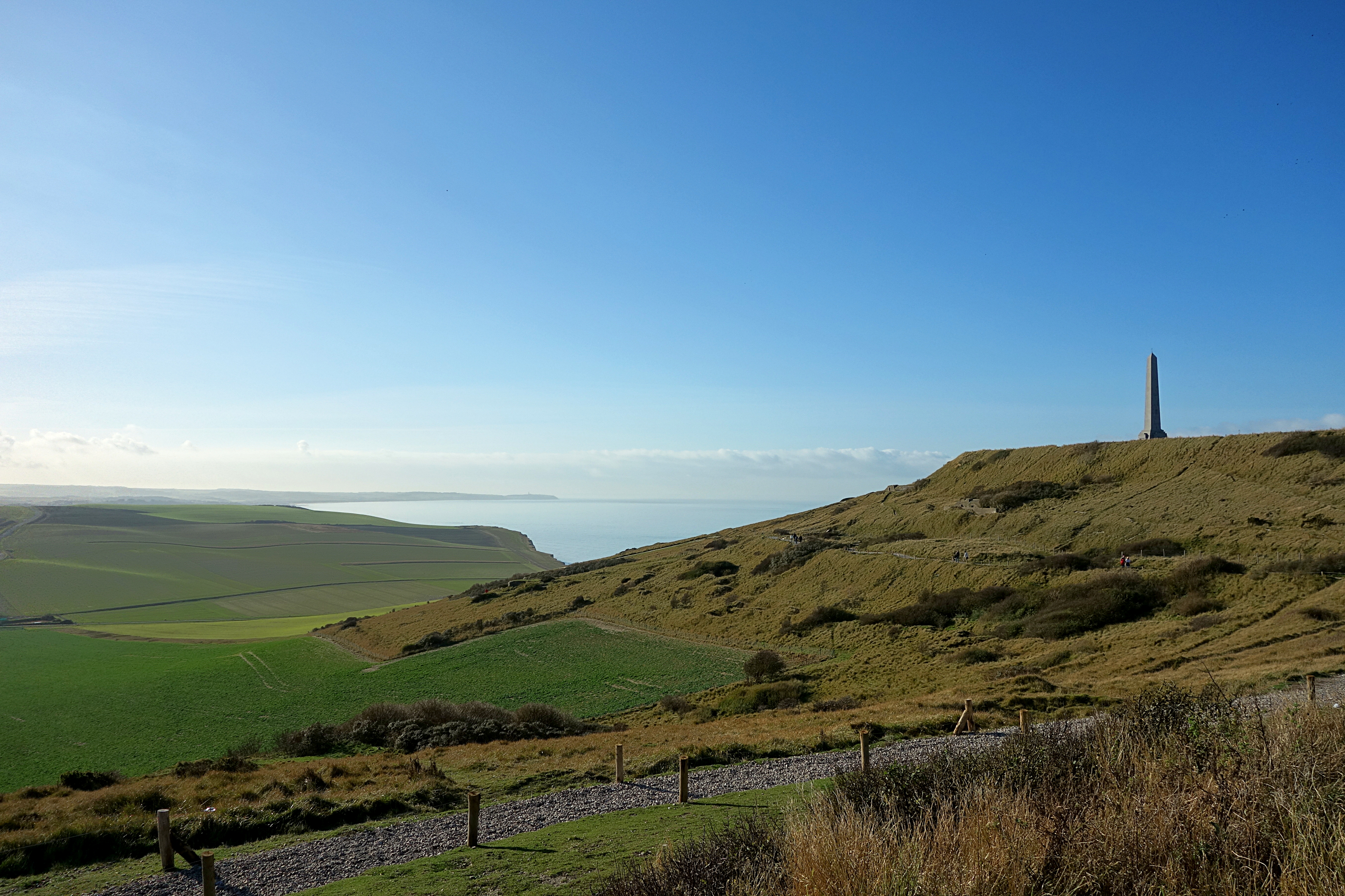 Le Cap-Gris Nez vu de puis le Cap Blanc-Nez.